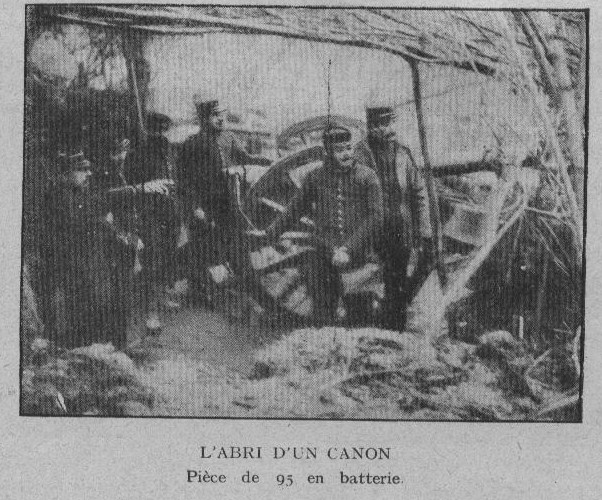 canon français de 95 en batterie; Lahitolle 95mm cannon?